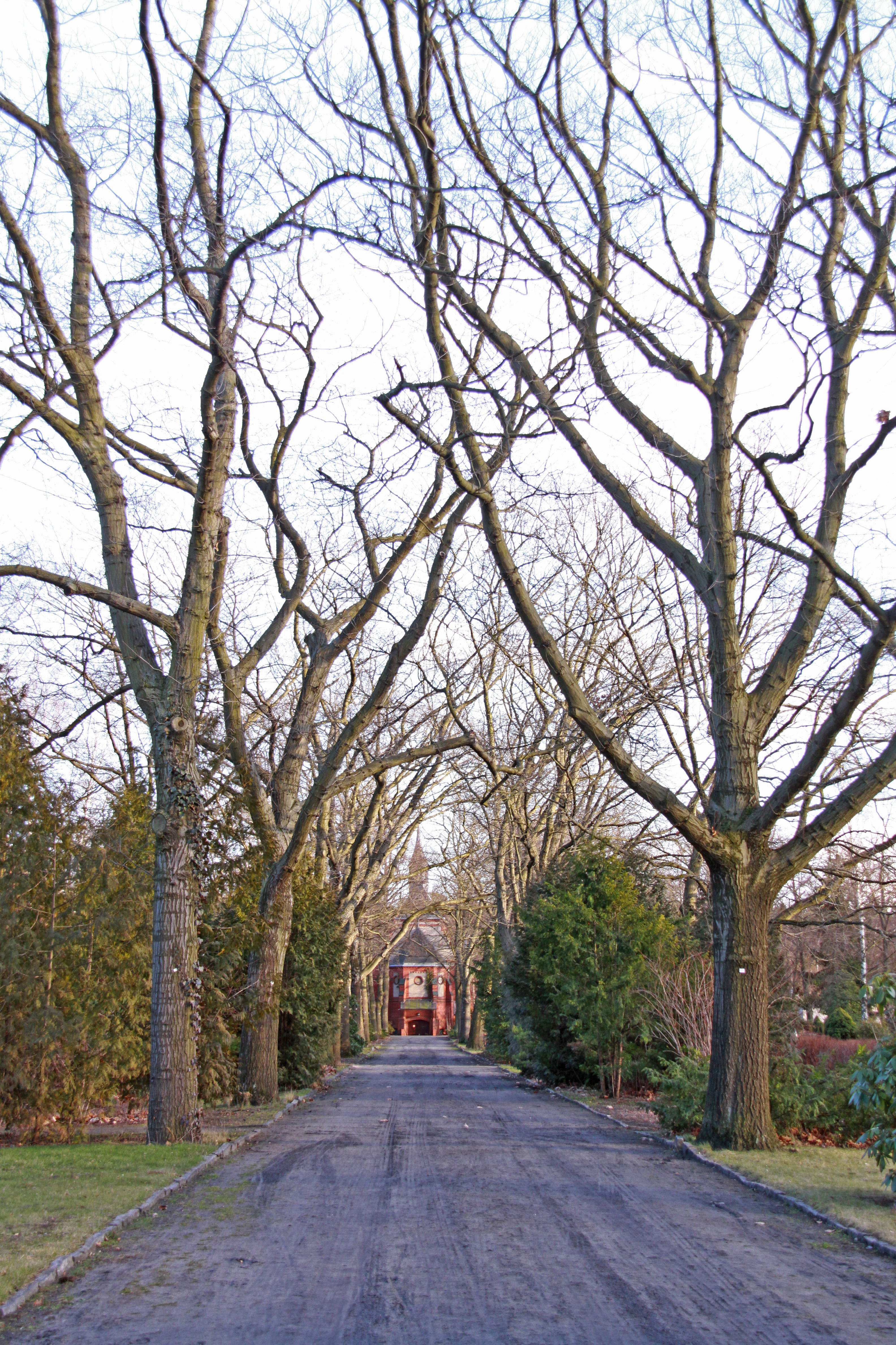 Waldfriedhof Berlin Oberschöneweide, Weg zur Kapelle